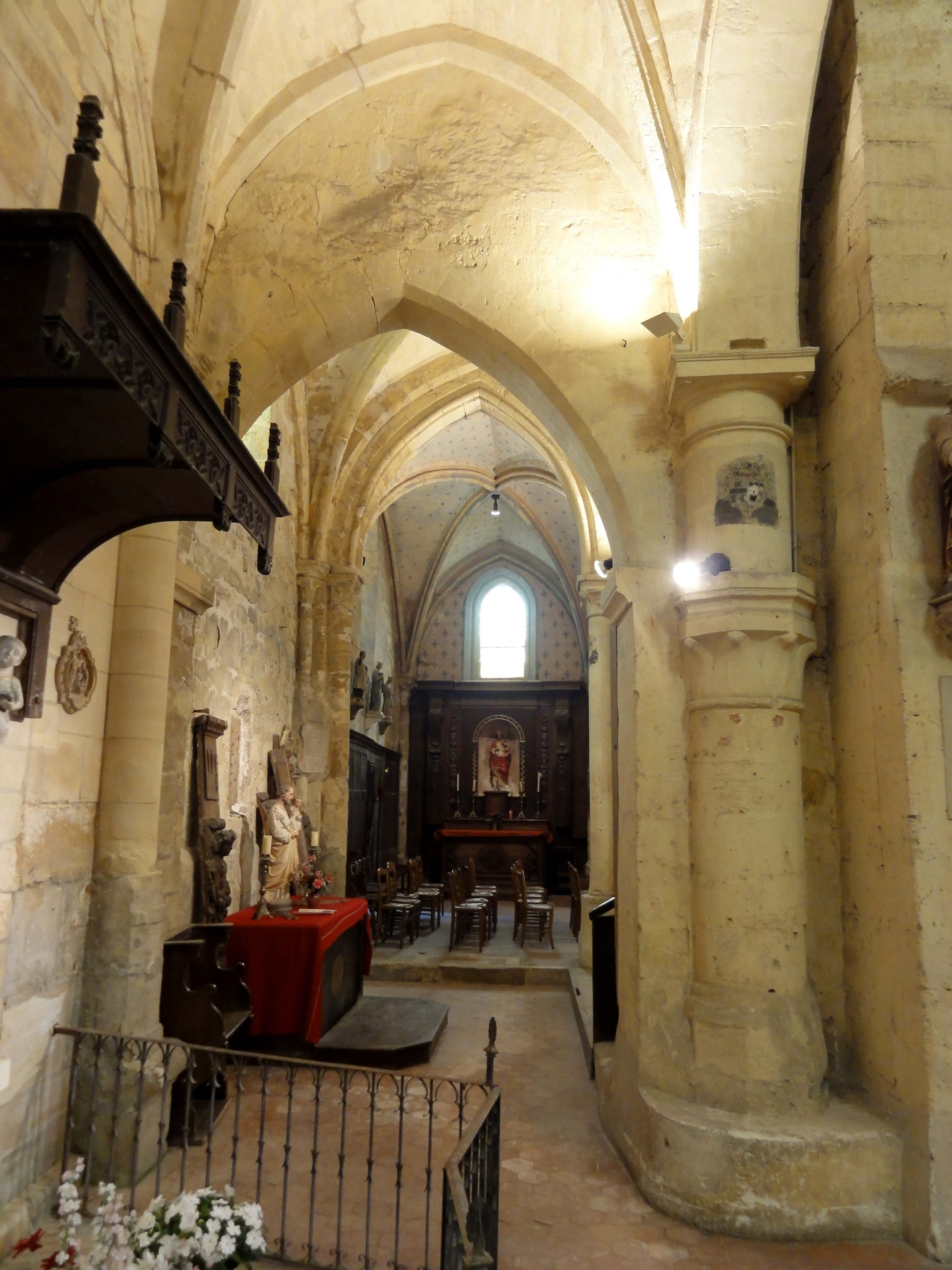 Intérieur de l'église (voir titre).